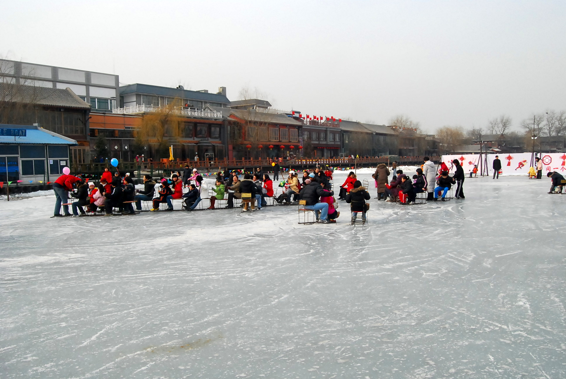 什刹海的冬天